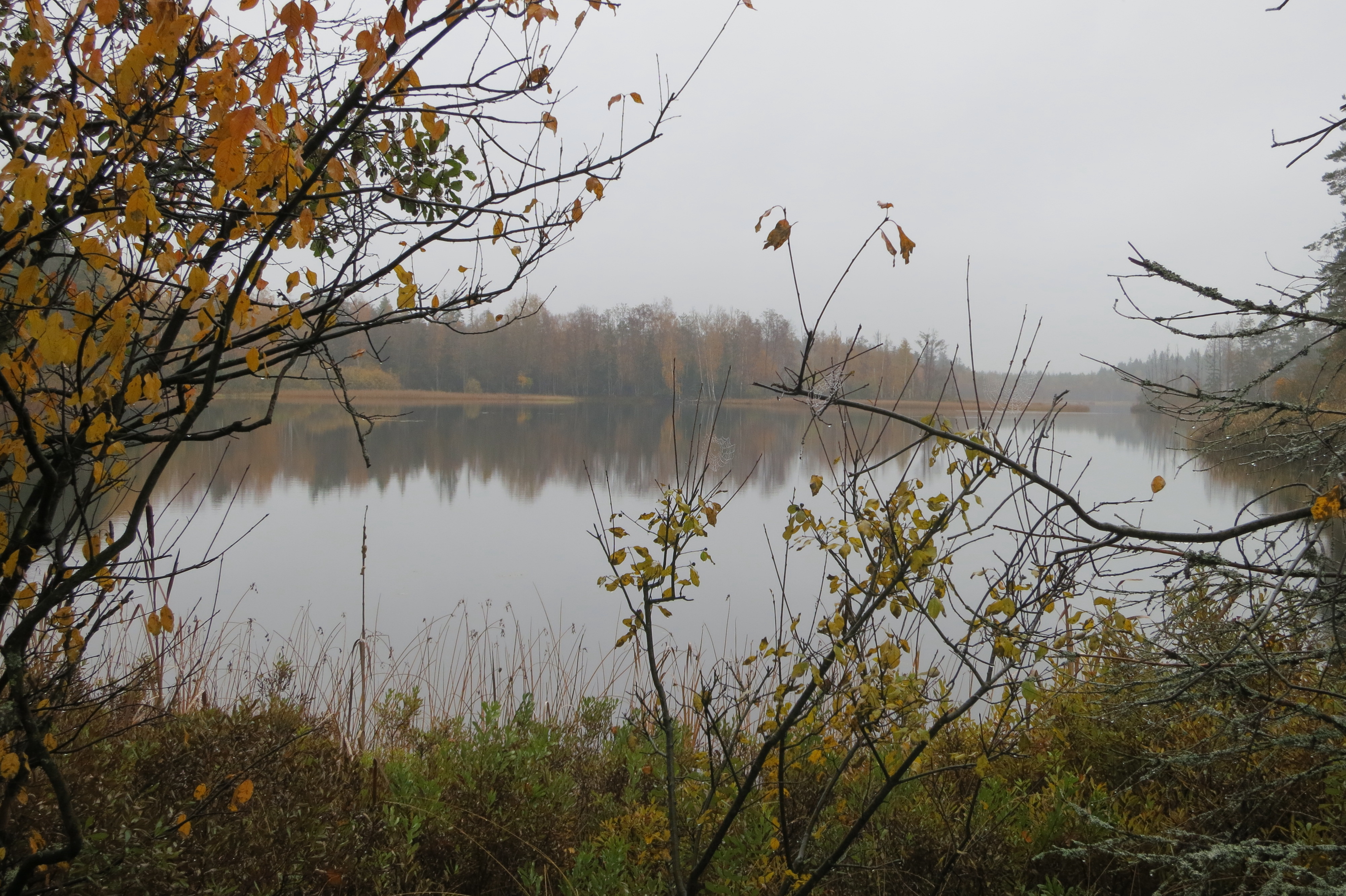 Sjön Hobergssjön, Tingsryds kommun